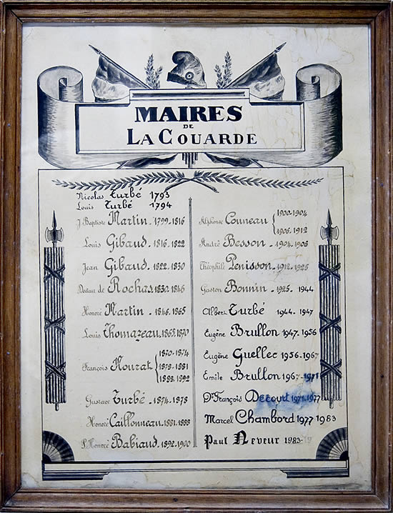 Tableau des maires de La Couarde-sur-Mer - île de Ré - Charente-Maritime Photo issue de ma banque d'images : Pep.per 11 octobre 2006 à 01:32 (CEST)